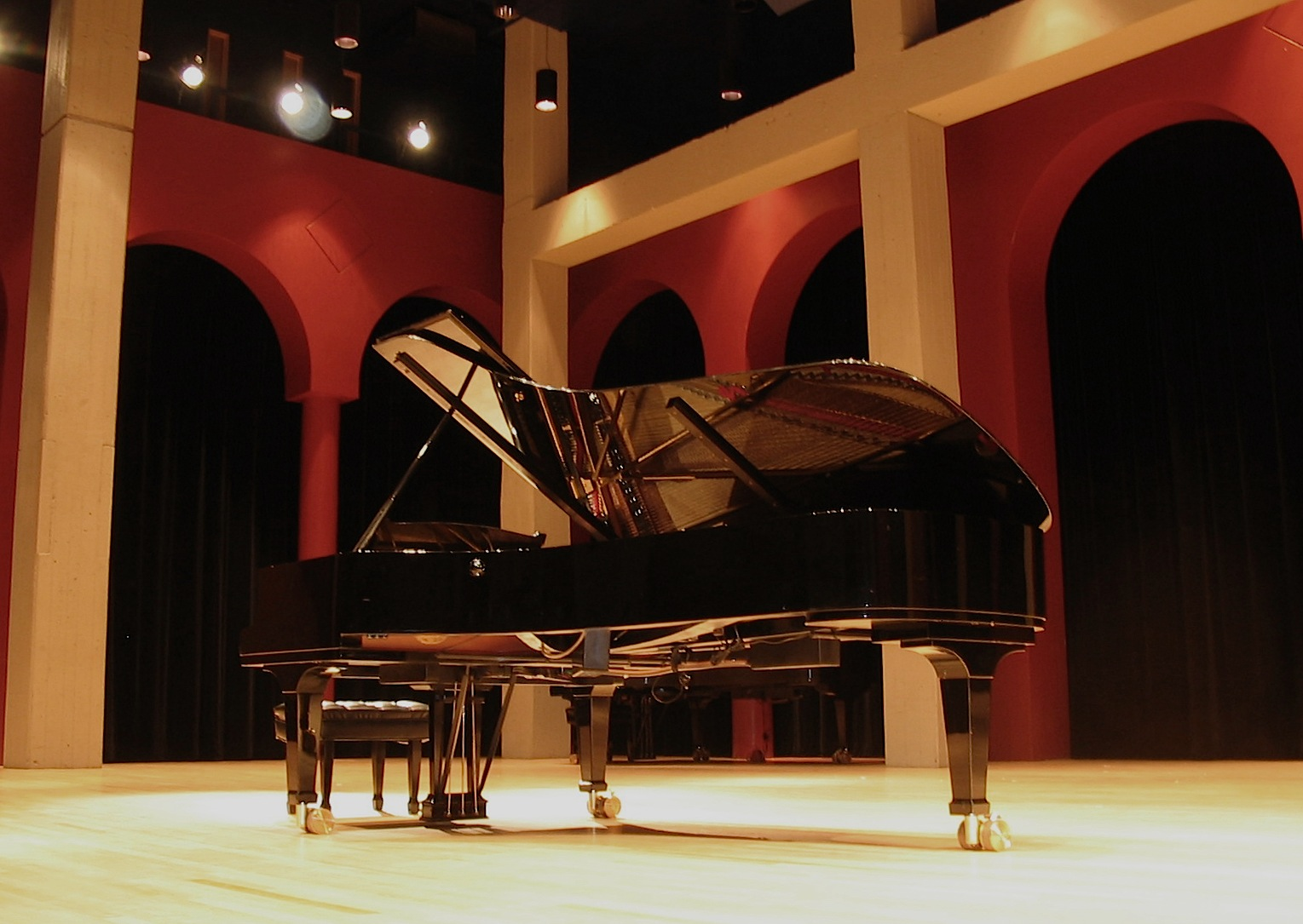 L'un des pianos de la salle Henri-Gagnon, placé au centre de la scène